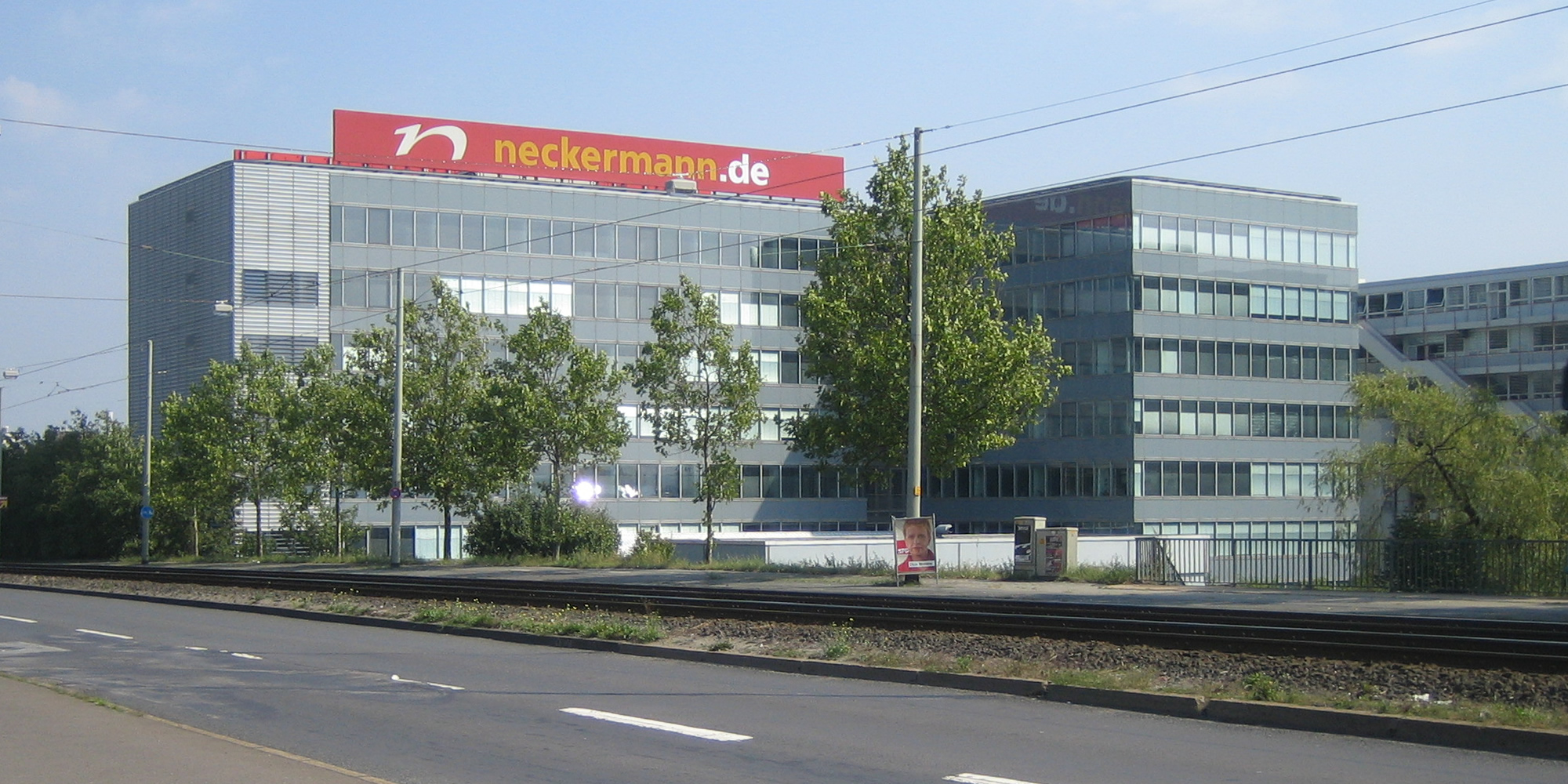 Neckermann AG